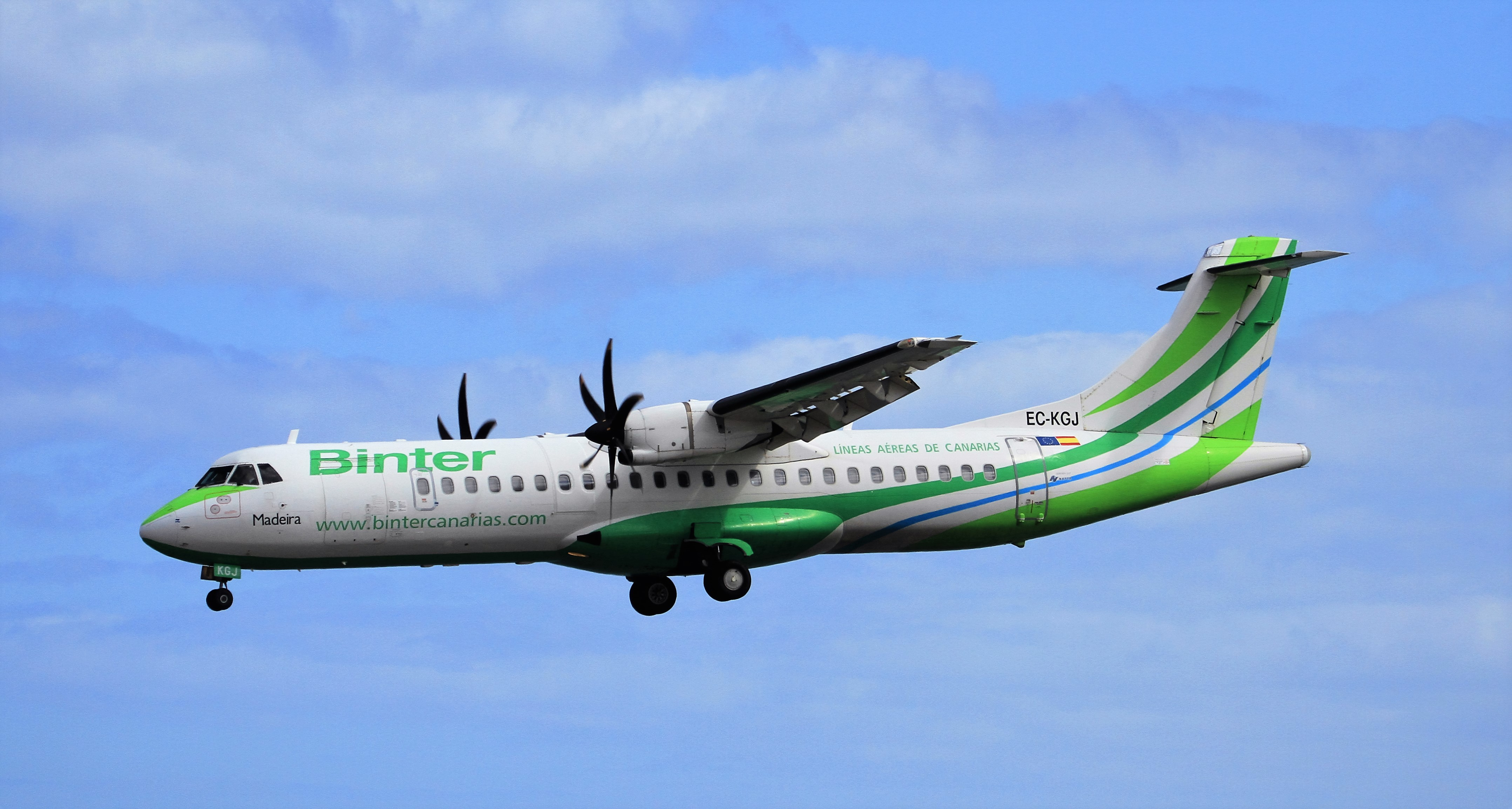 EC-KGJ ATR72-500 Binter Canarias Lanzarote 22-03-2016